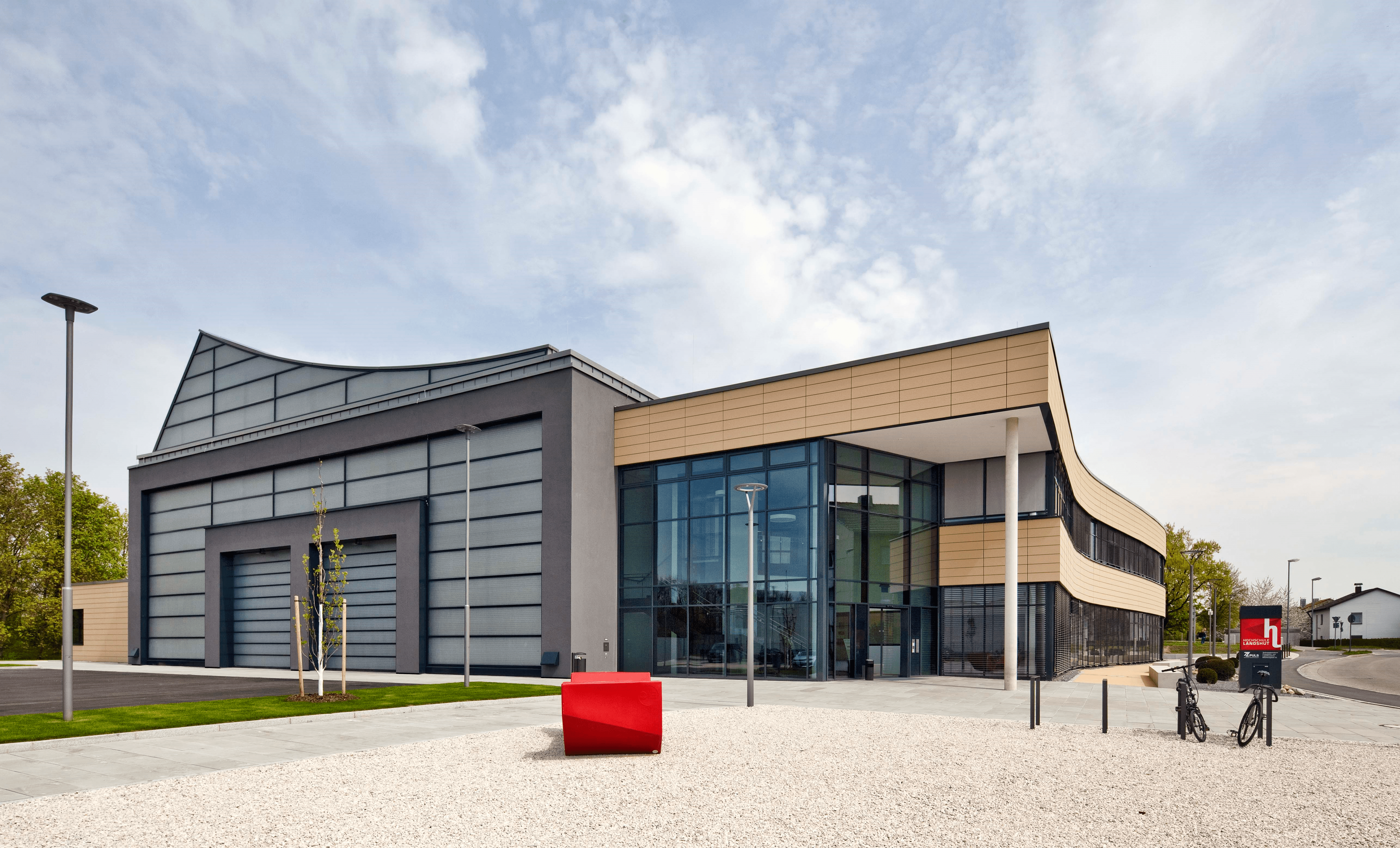 TZ PULS